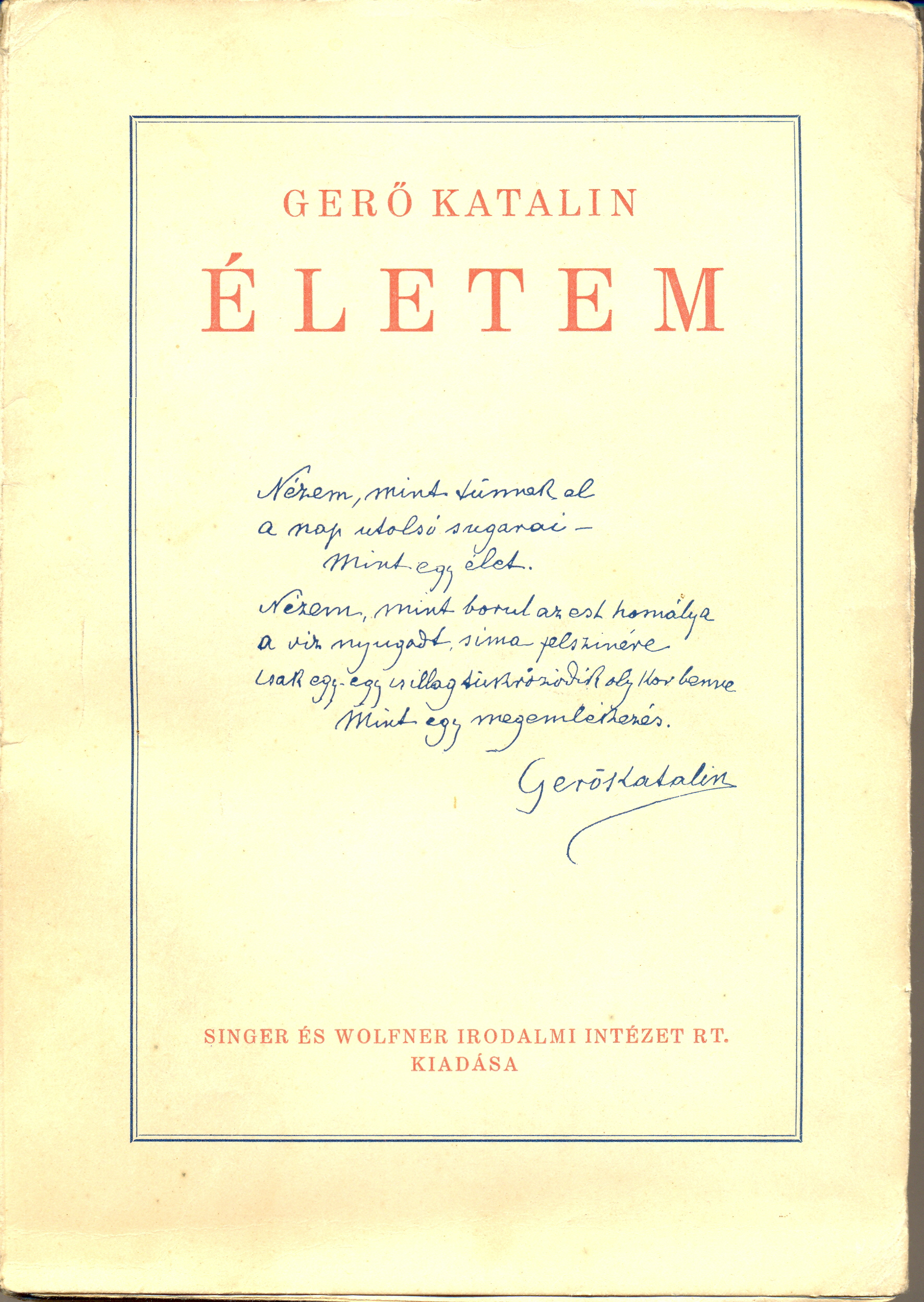 Gerő Katalin: Életem c. önéletrajzi regényének címlapja. Megjelent 1929-ben.